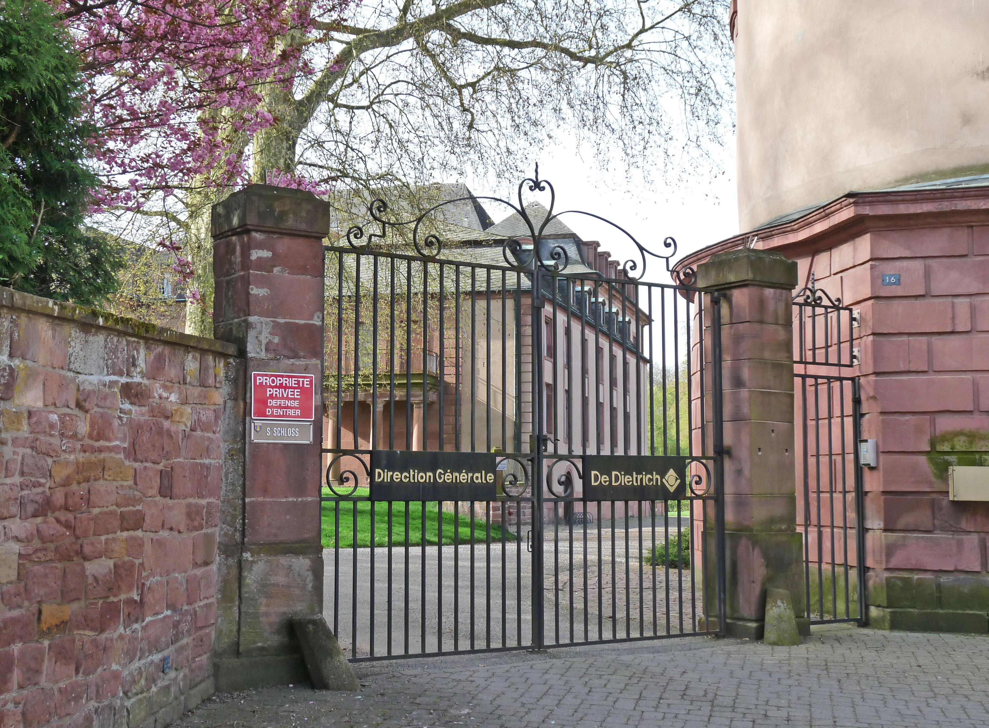 Château De Dietrich à Reichshoffen (Bas-Rhin). Classé Monument historique en 1940.